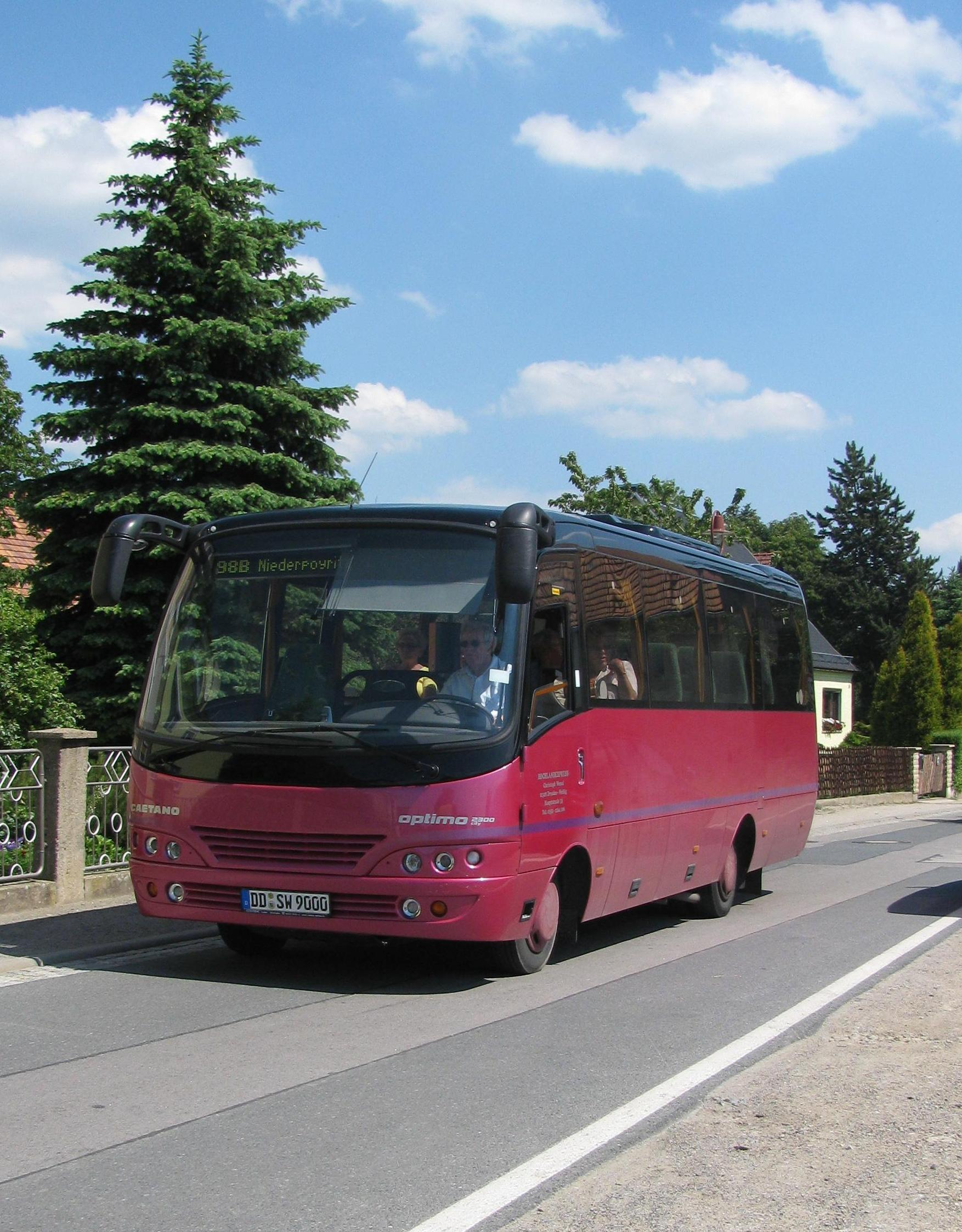 Bus des Unternehmens Hochlandexpress auf dem Weg nach Niederpoyritz